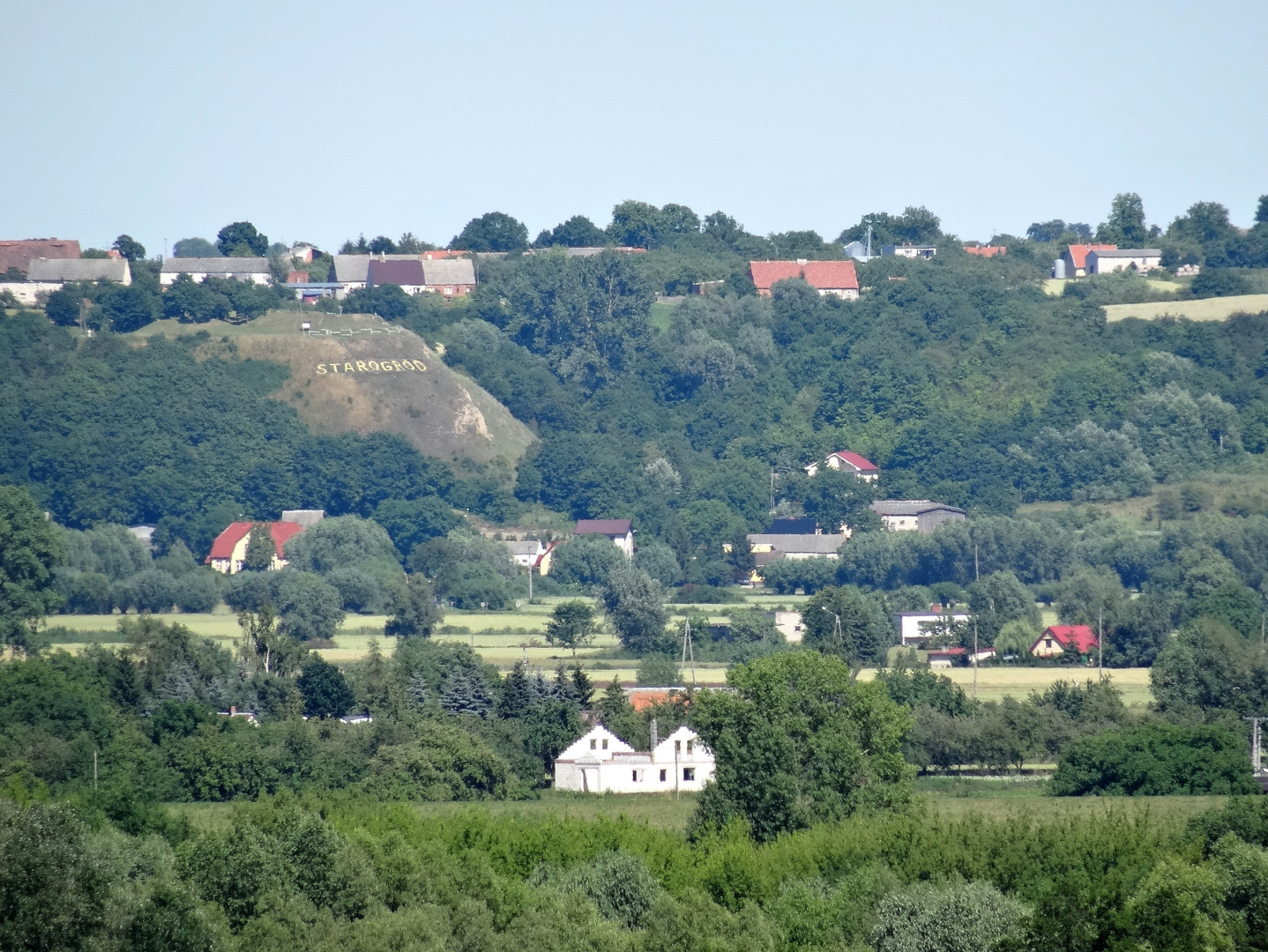 Widok z grodziska Talerzyk koło Topolna na Dolinę Dolnej Wisły